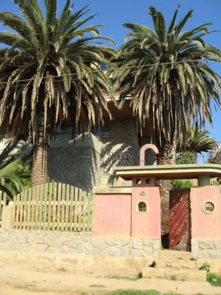 La Casa de la Familia Gondeck en El Quisco es una de las muestras de arquitectura patrimonial de esta caleta chilena